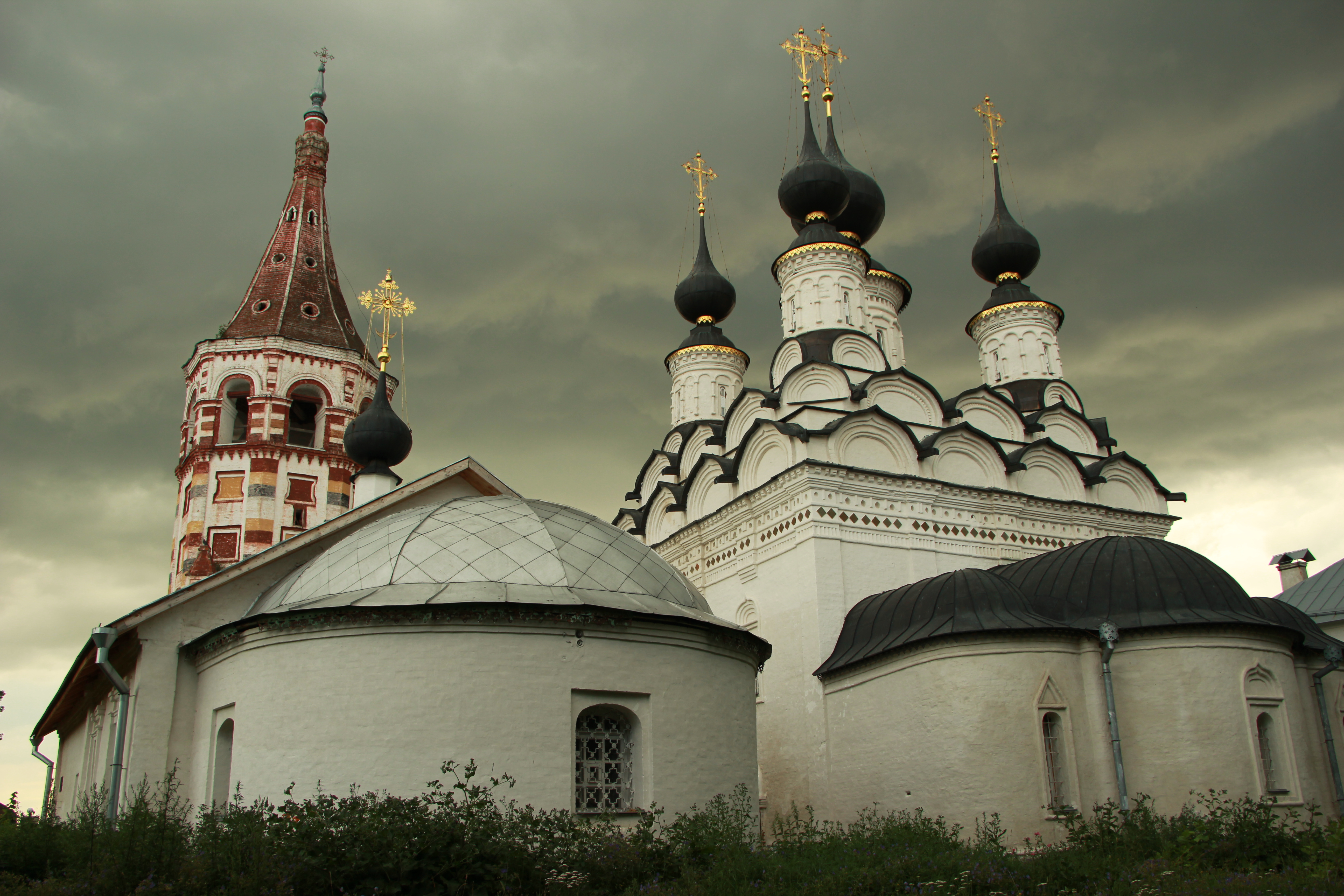 Храмовый комплекс: Ленина улица, Суздаль, Суздальский район, Владимирская область